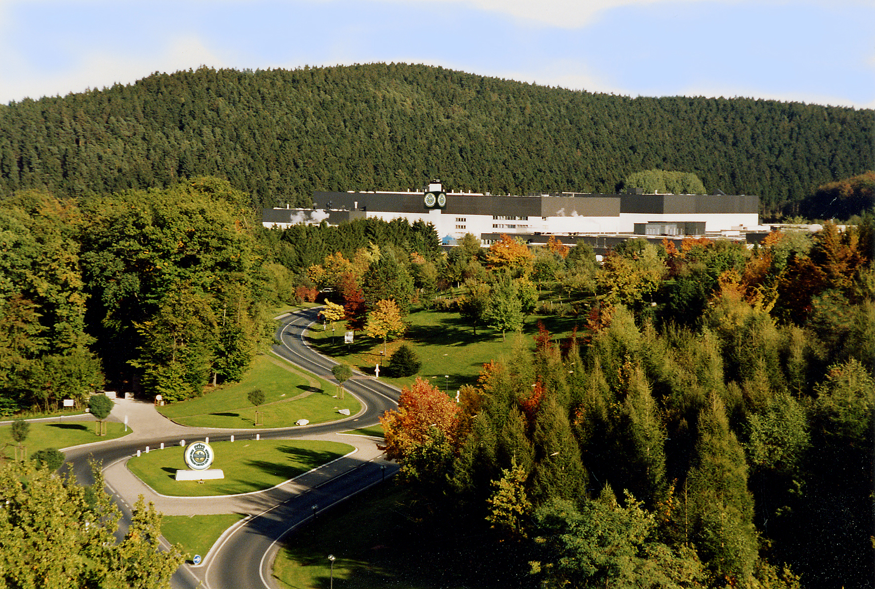 Warsteinerbrauerei im Waldpark